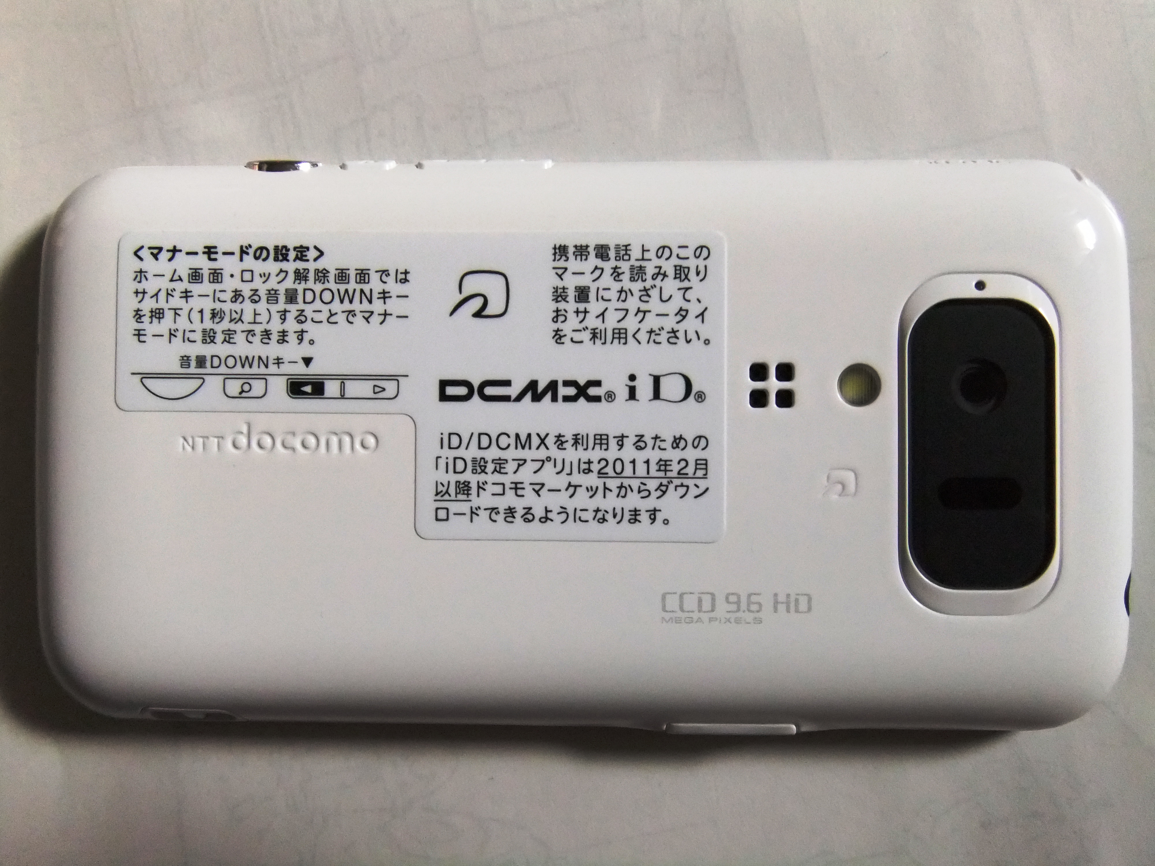 SH-03Cの裏面にはカメラ、赤外線ポート、FeliCaカードがある。